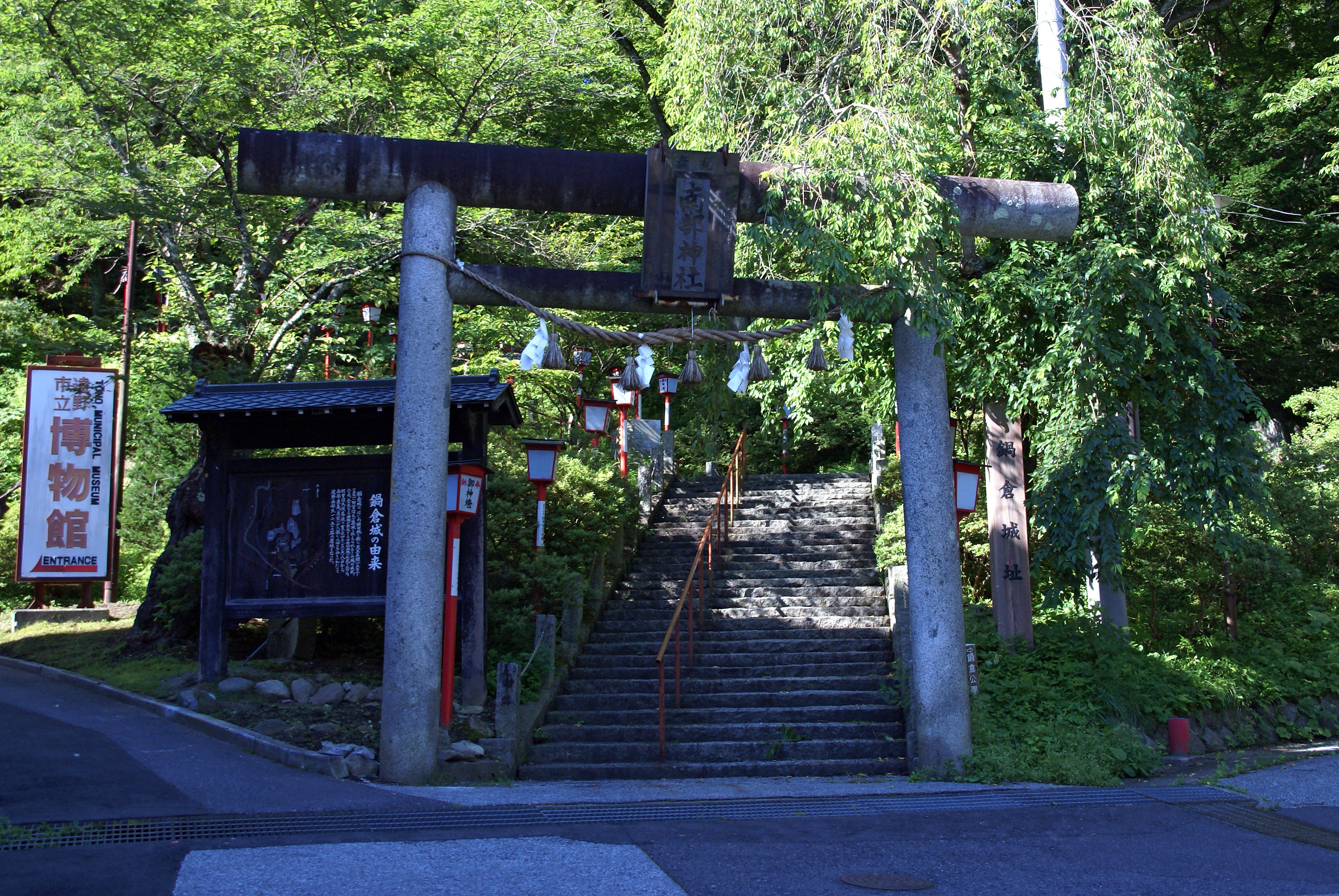 Nanbu-jinja in Tono, Iwate prefecture, Japan